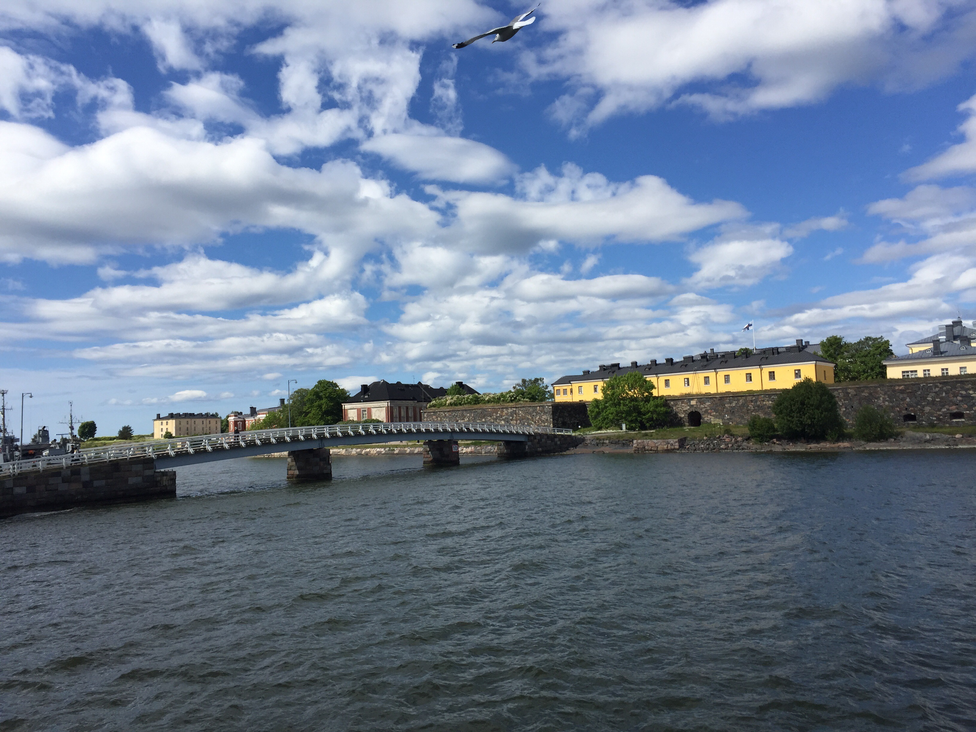 Свеаборг